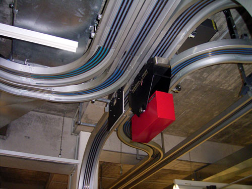 Buchförderanlage1